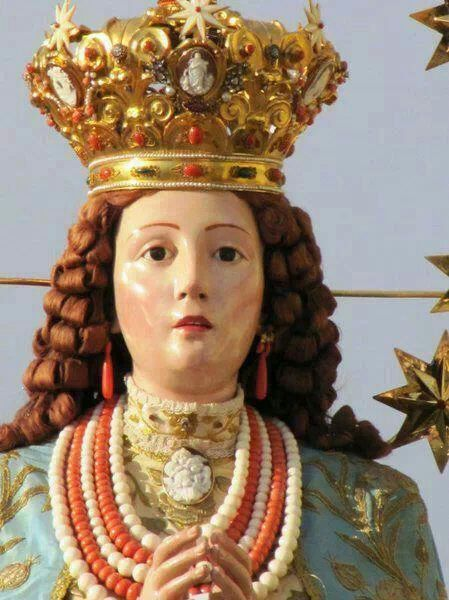 tdg